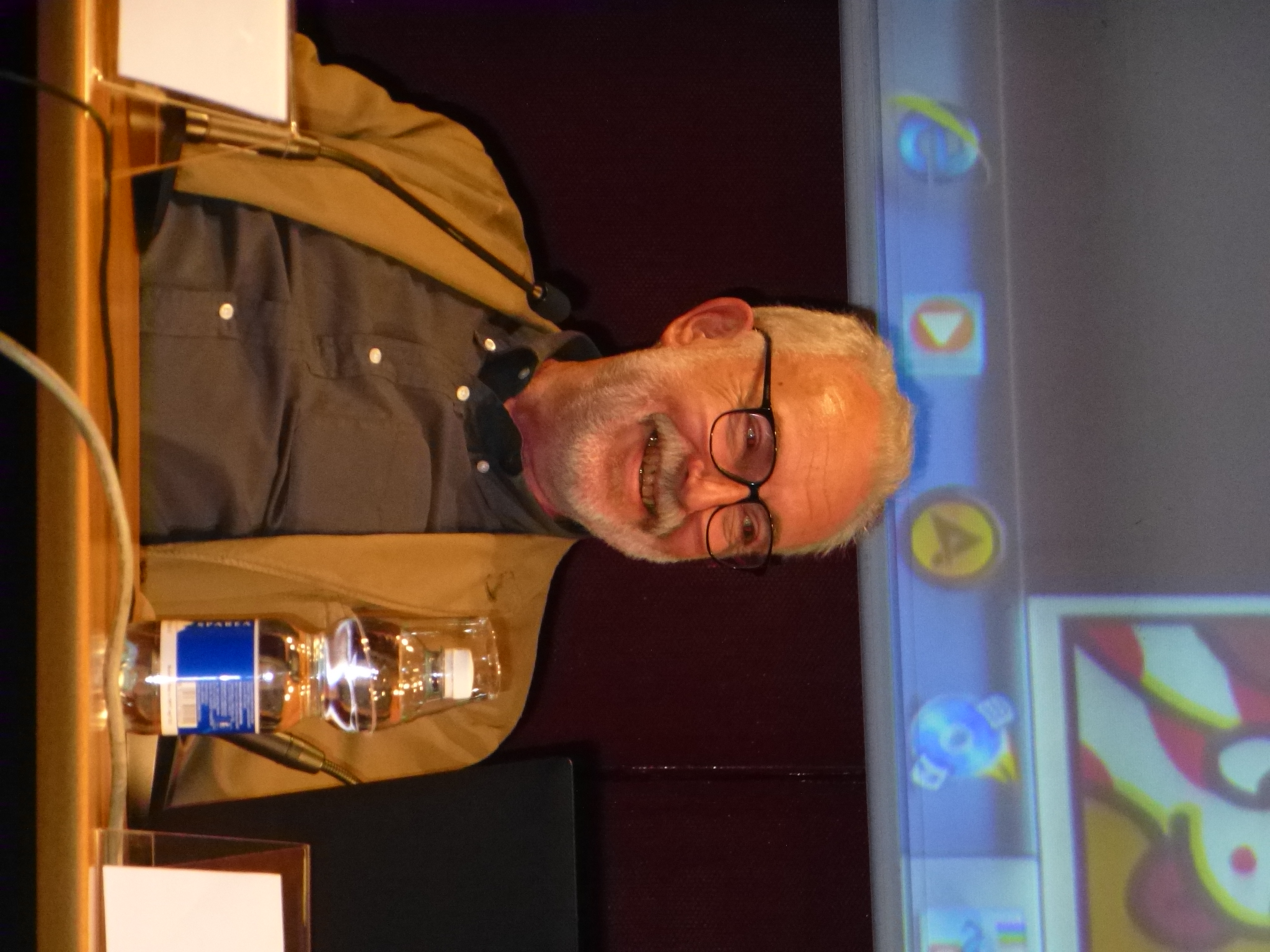 Francesco Tullio Altan al Salone del Libro di Torino 2014